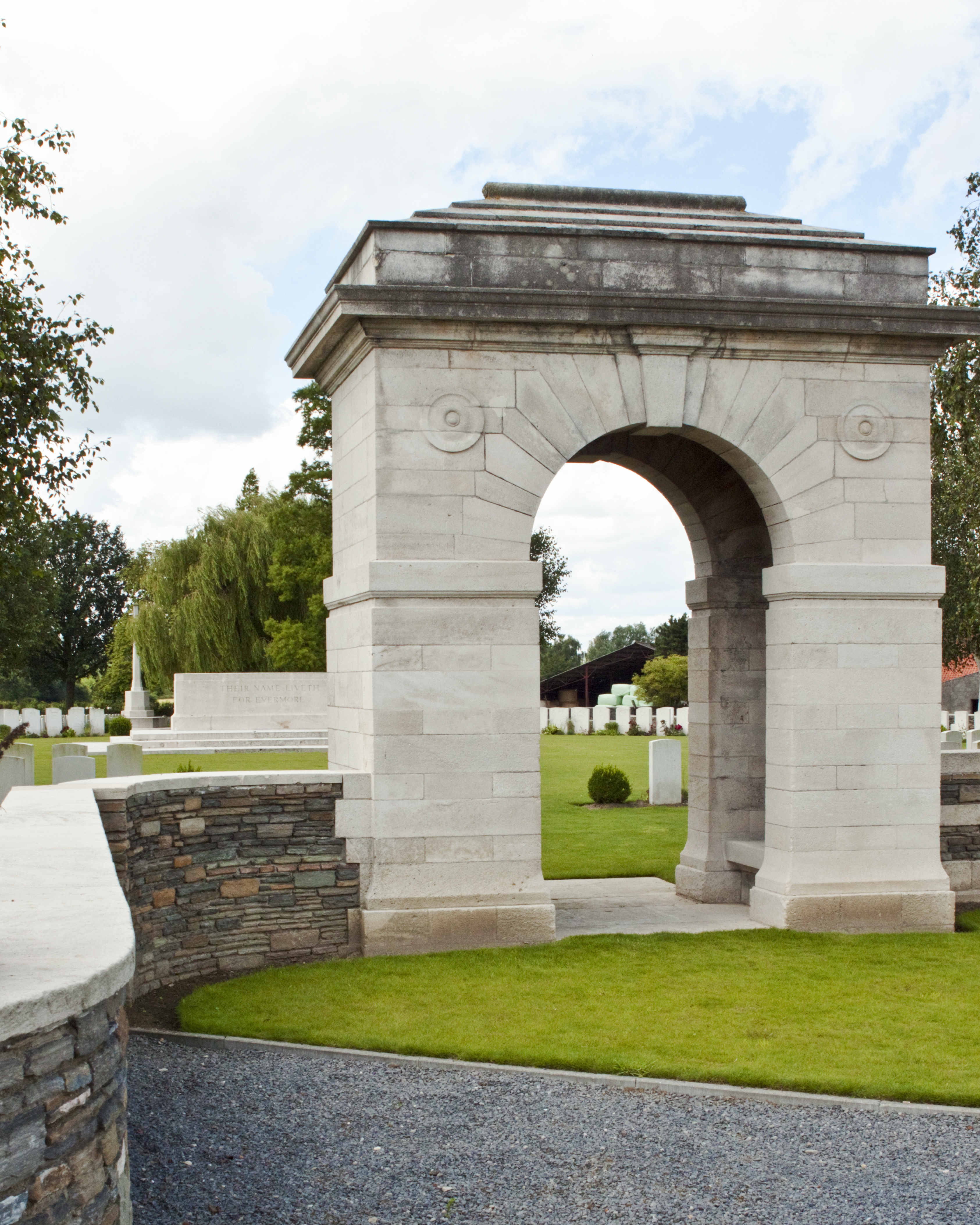 Railway Dugouts Burial Ground